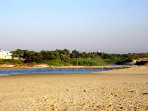 poleg stream